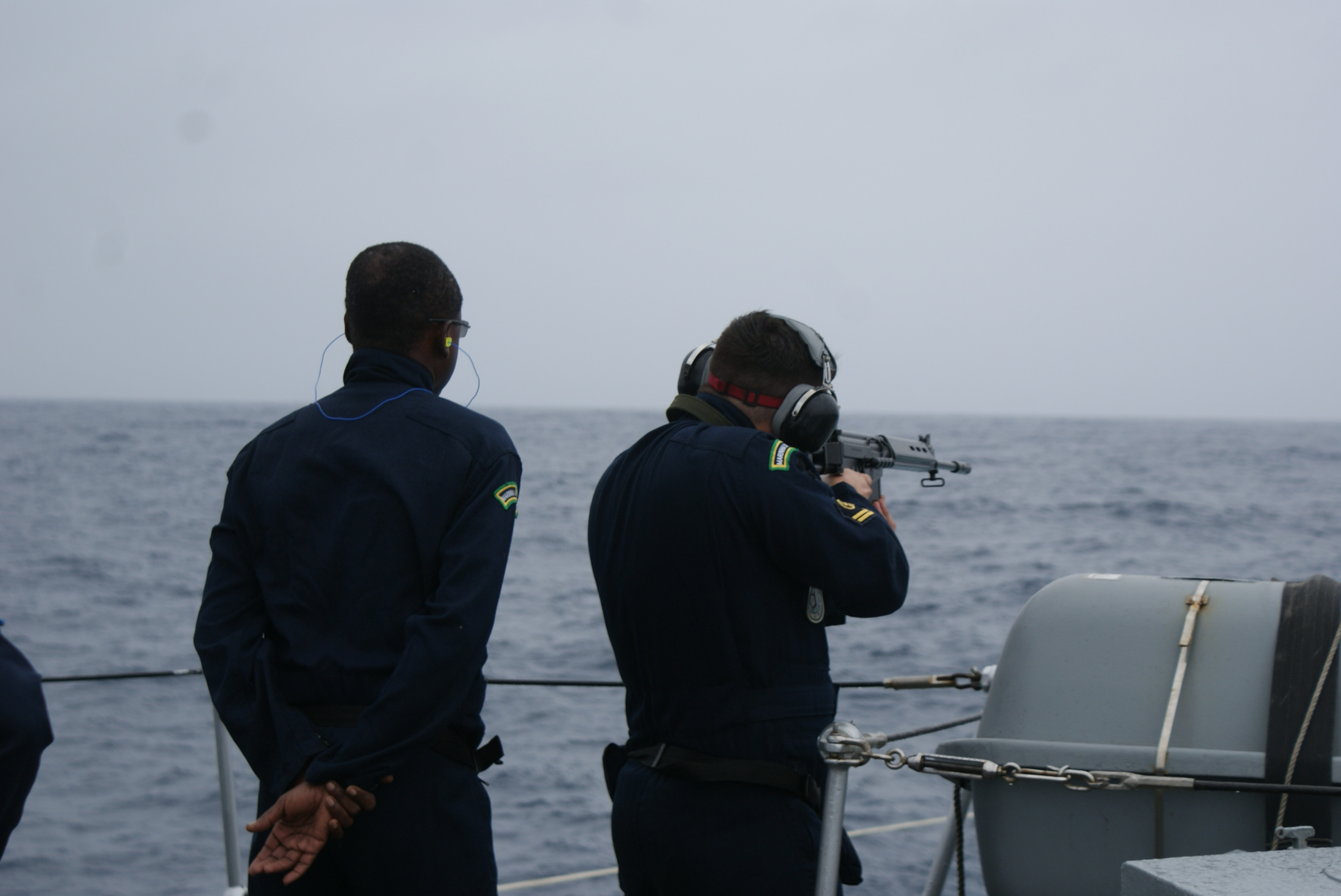 2015 Arquivo liberado pela Marinha do Brasil através de projeto GLAM com Wiki Educação Brasil